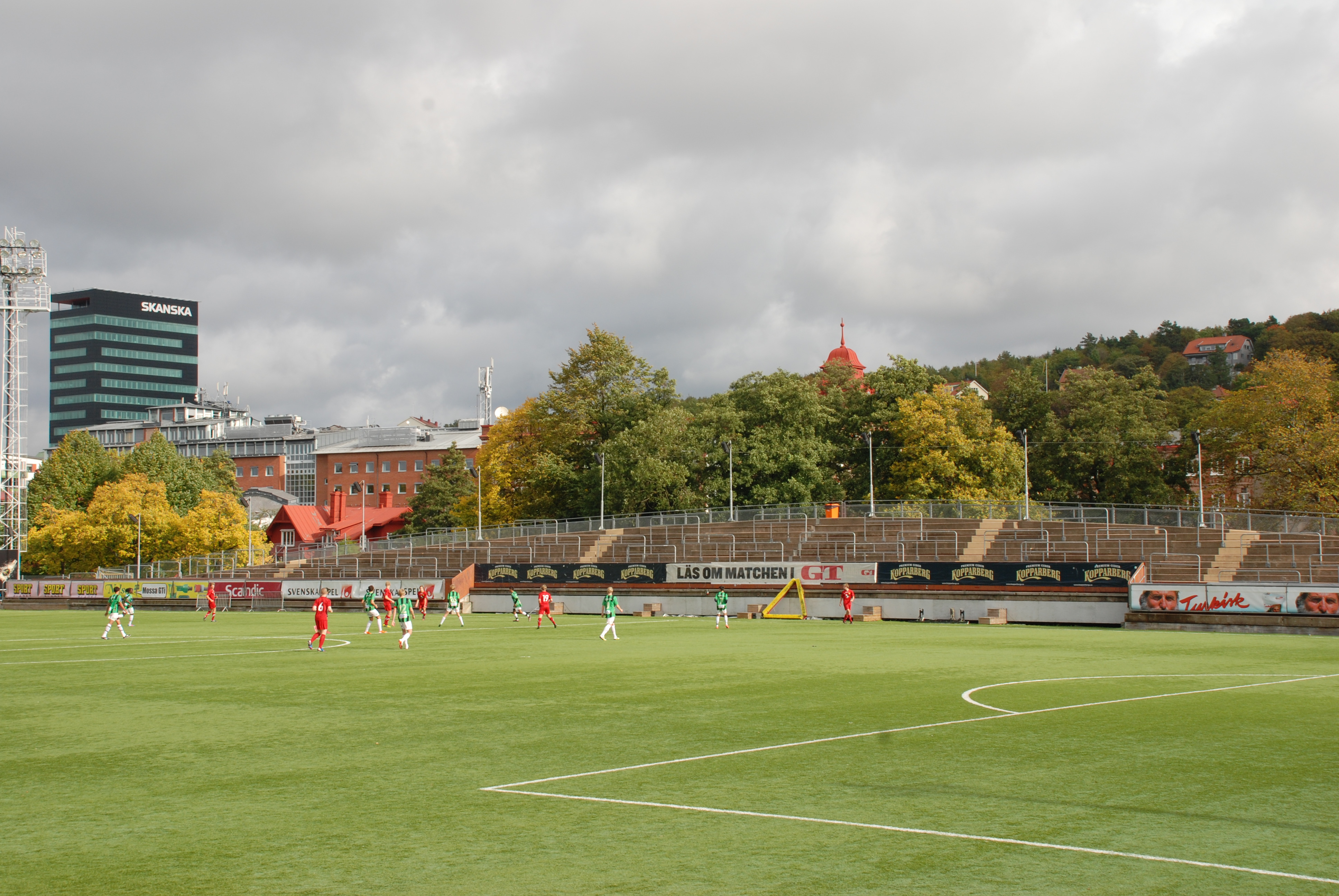 Valhalla idrottsplats i stadsdelen Heden i Göteborg.